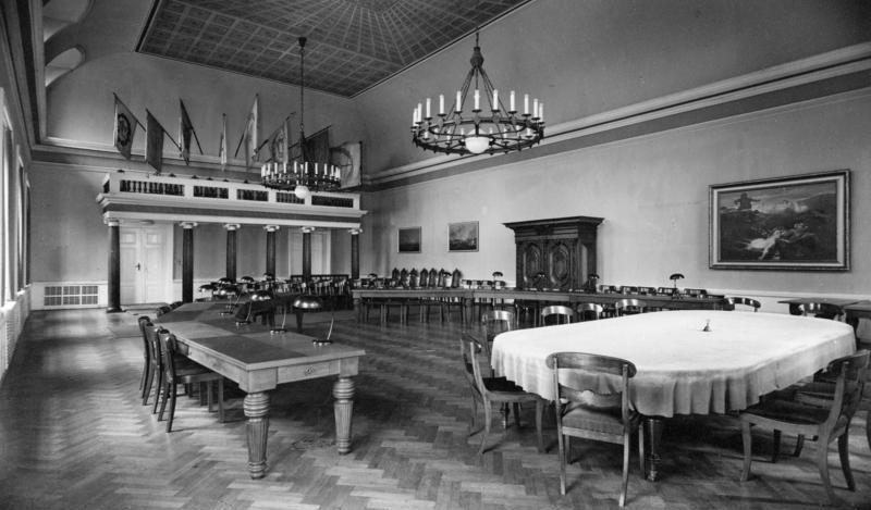 Rathaussaal Schleswig